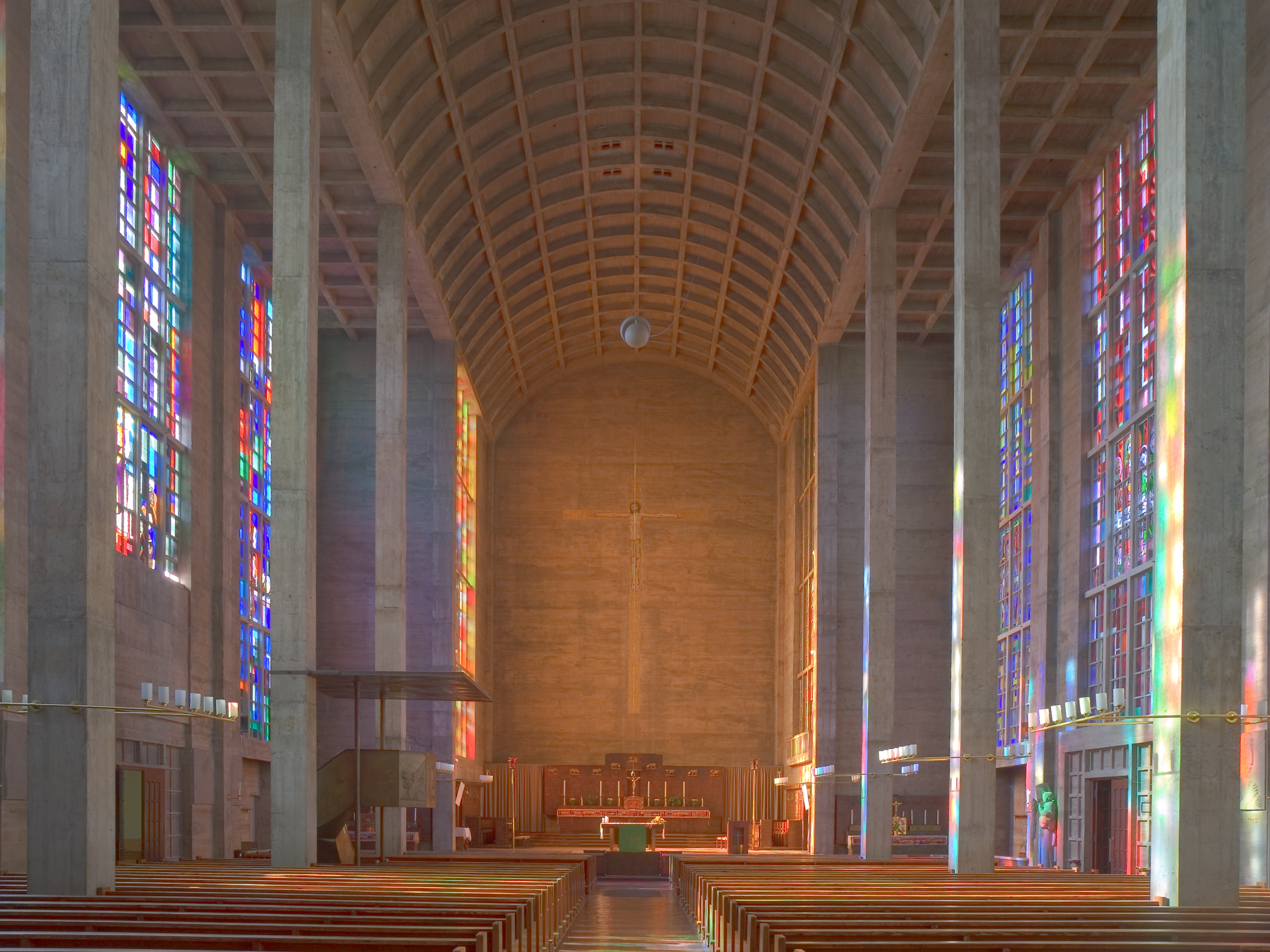 Innenansicht gegen den Chor von Karl Mosers Antoniuskirche in Basel, Schweiz